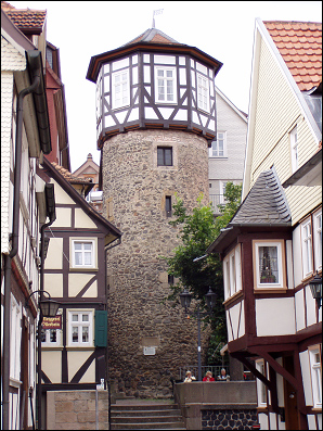 Der Ankerturm, ein Wahrzeichen der Stadt Lauterbach (Hessen)